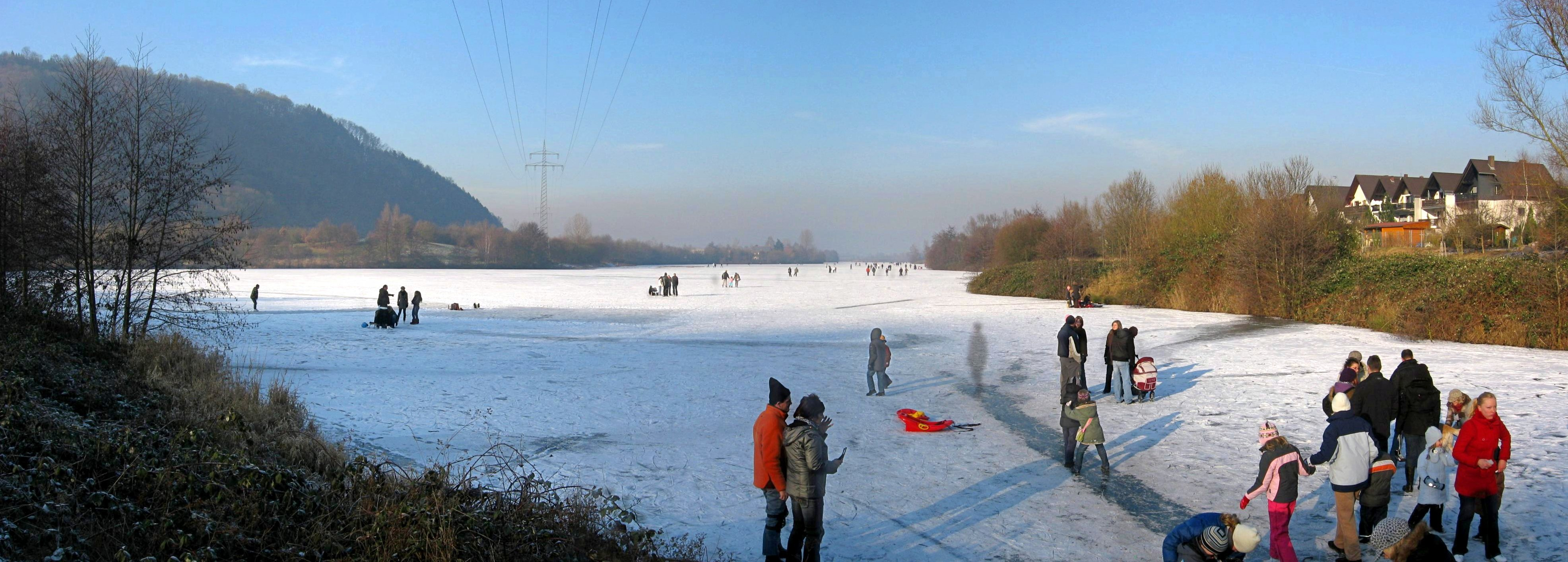 Zugefrorener Ökosee am 11.01.2009, Ausgleichsmaßnahme zur Saarkanalisierung